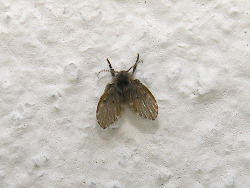 Foto realizada en Bastavales no verán de 2005 Galicia